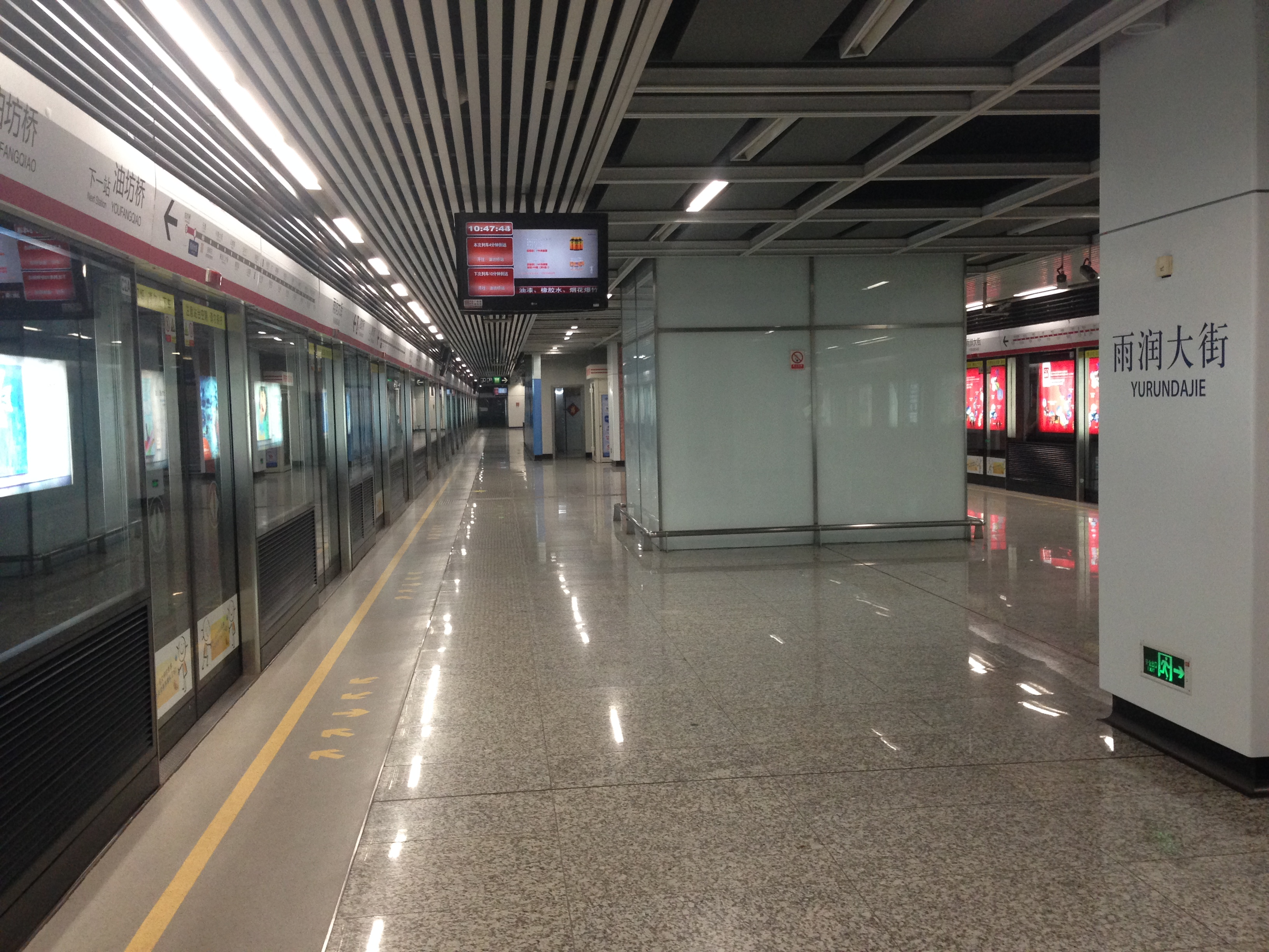 南京地铁2号线雨润大街站站台